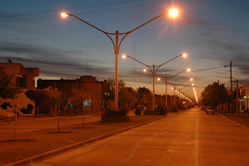 Avenida Pres. Perón. Jovita, Prov. de Córdoba.